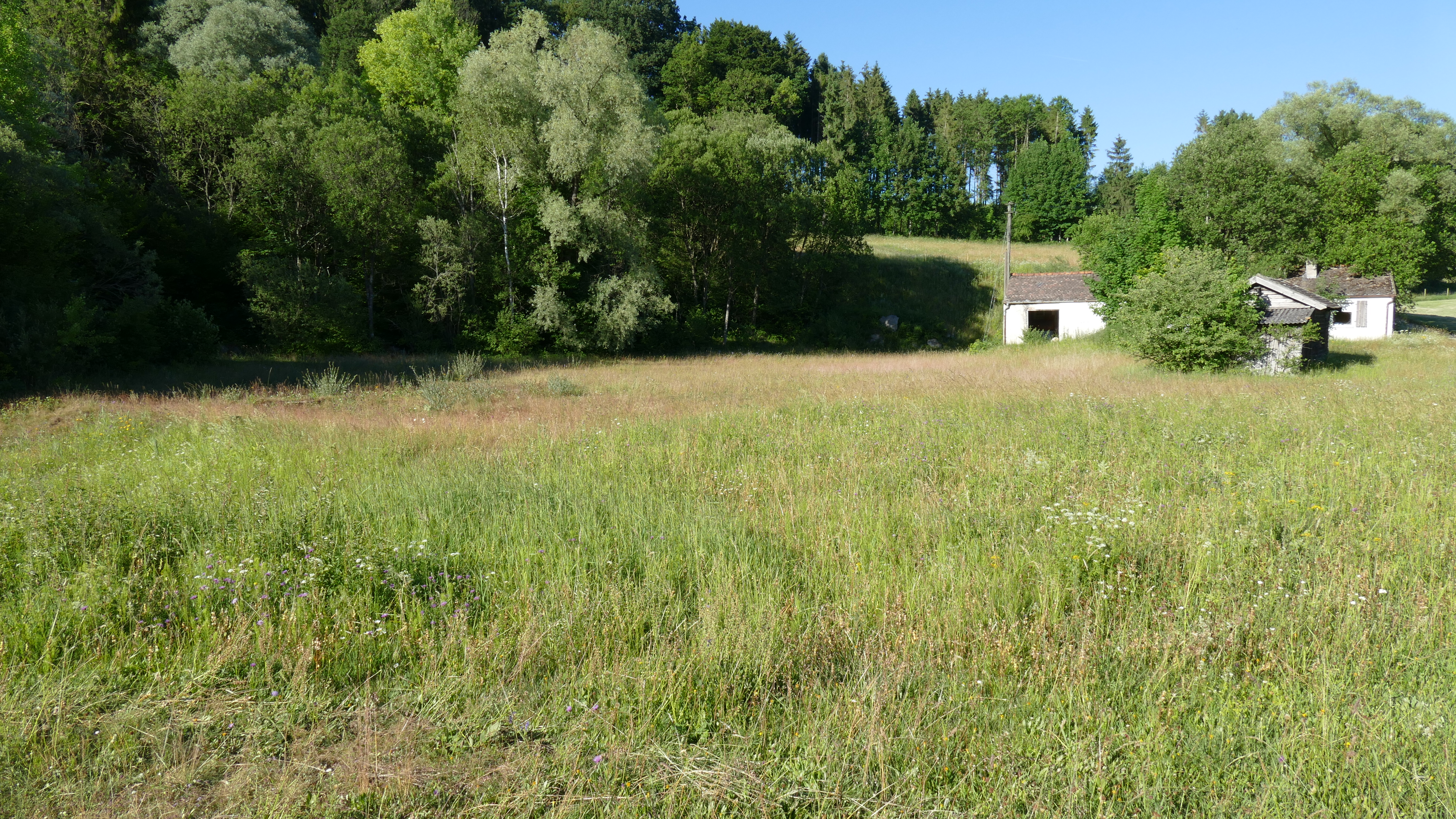 Kalktuff-Steinbruch WSW von Pullenhofen, Geotop ID 175A003